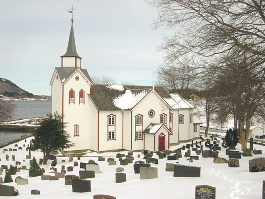 Gjemnes and the Øre kirke